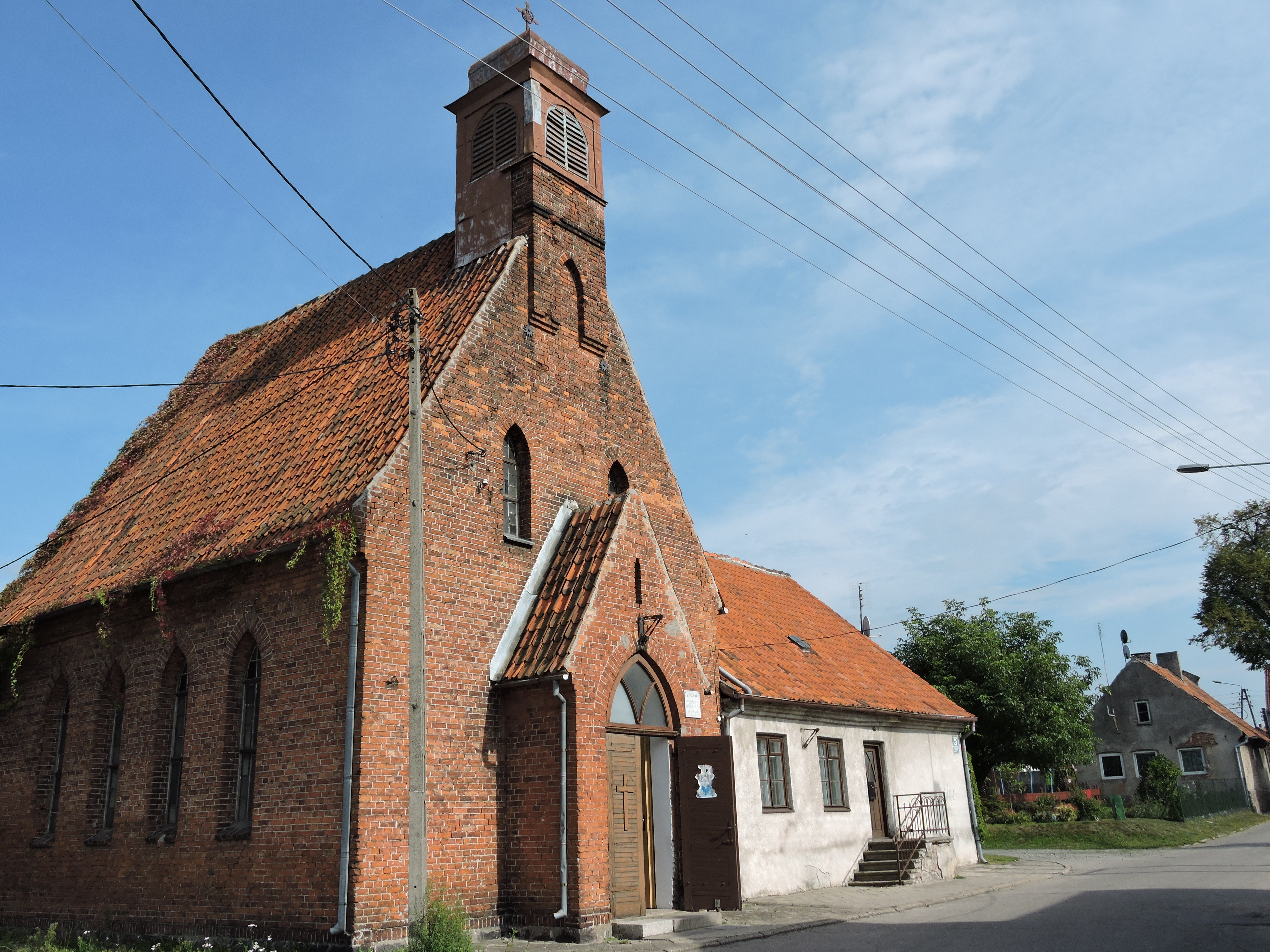 Tolkmicko, kaplica ewangelicka, ob. kościół polsko-katolicki pw. Matki Bożej Anielskiej, 1887